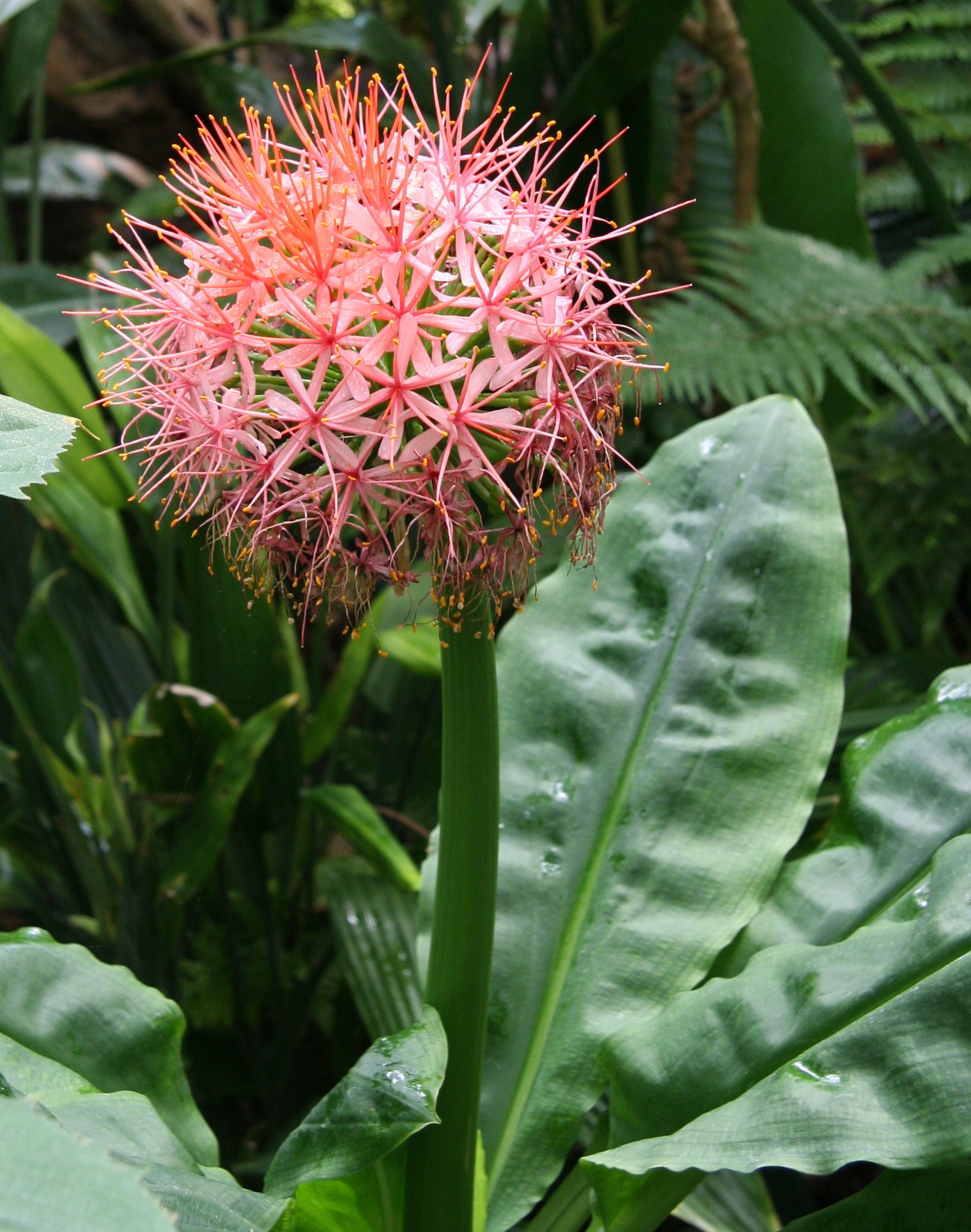 Scadoxus cinnabarinus im Botanischen Garten Dresden